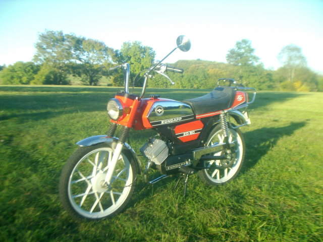 Zündapp-Mofa ZD-50-TS, Baujahr 1980. (NEUZUSTAND nach Totalrestauration).